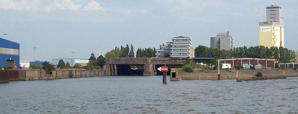 U-Boot-Bunker Hornisse in Bremen. Einfahrt Weserseite